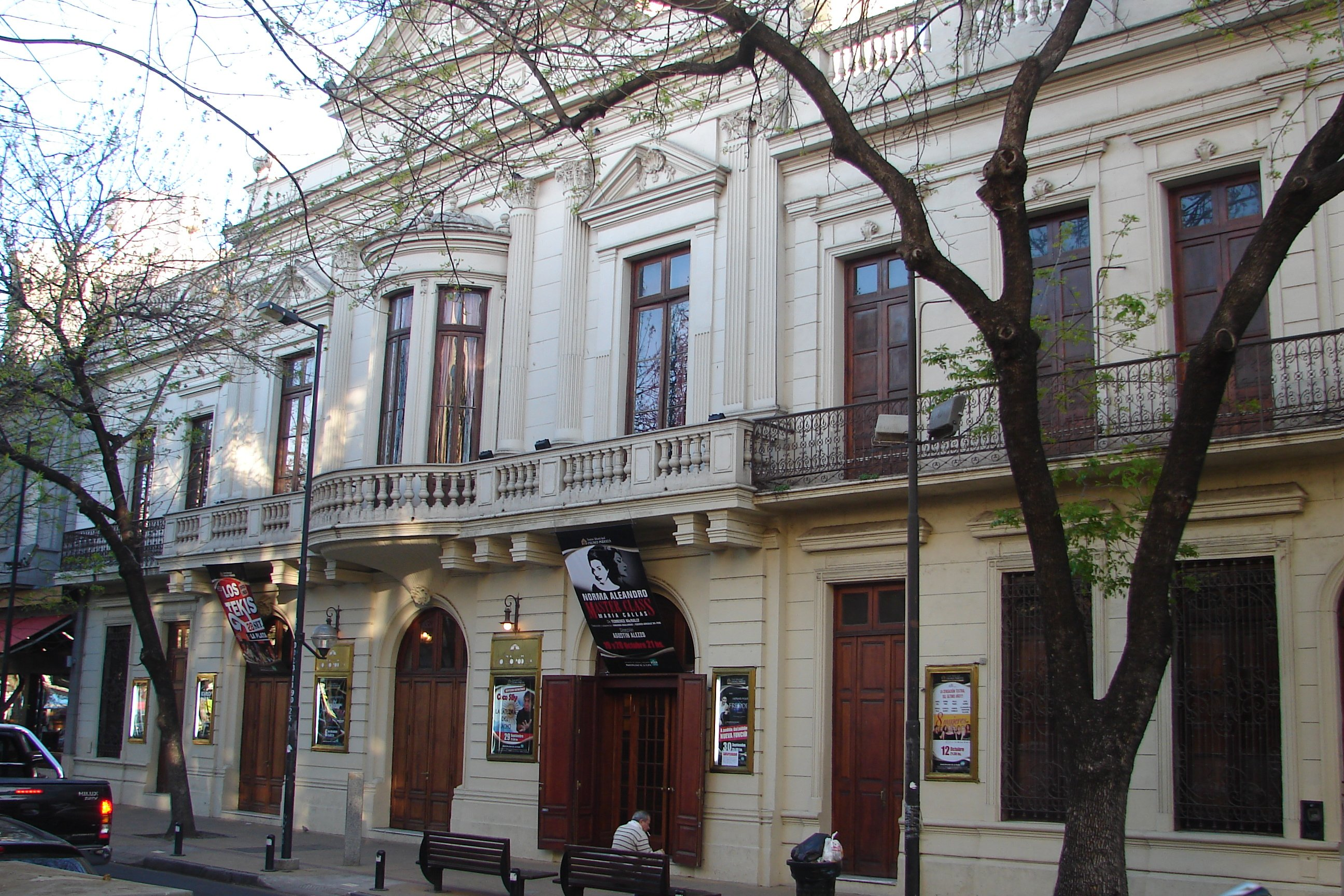 Frente del Teatro Municipal Coliseo Podestá